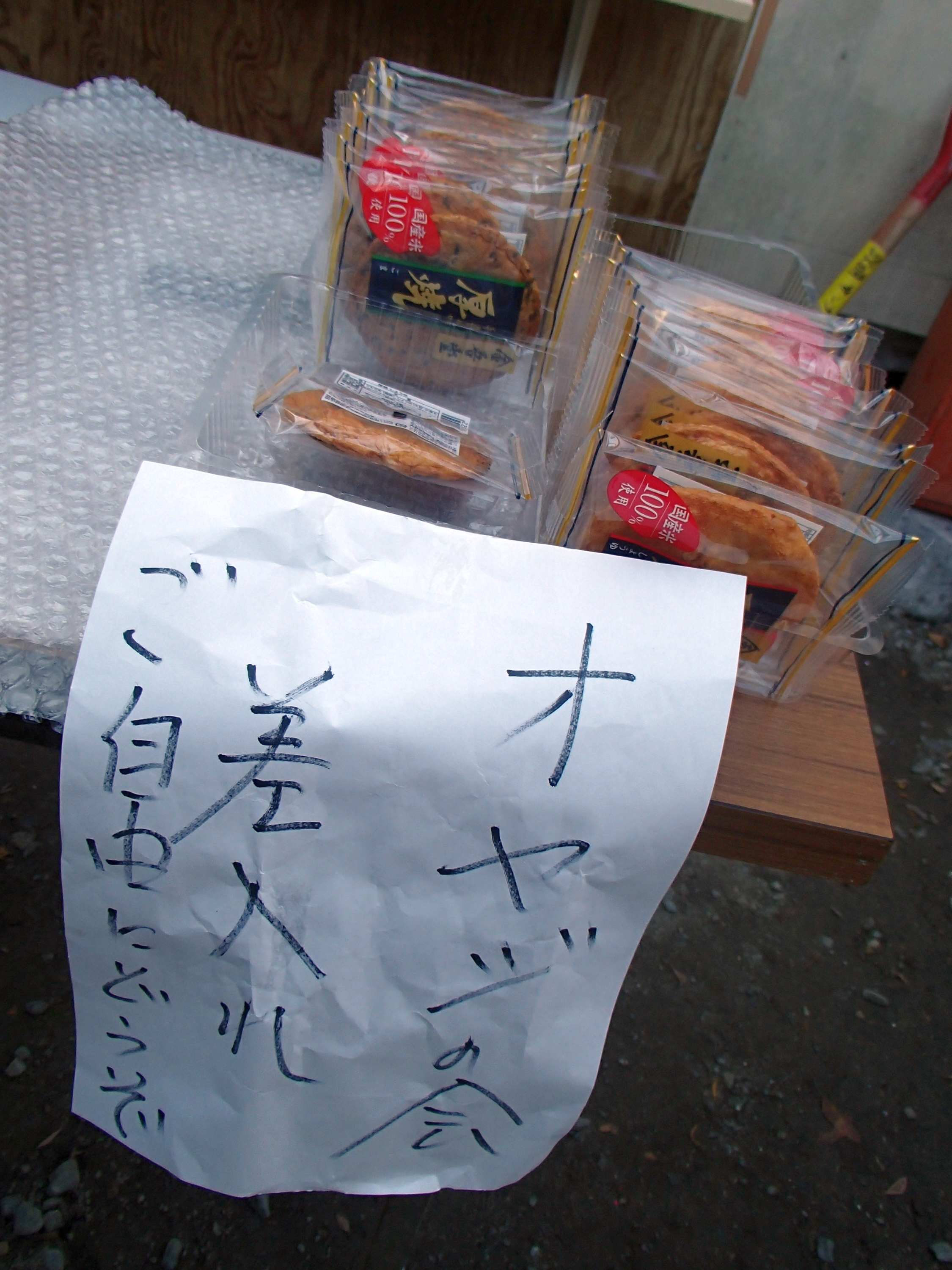 国産米100% 黒ごま醤油 / 醤油 2種類 金吾堂 厚焼 [1]